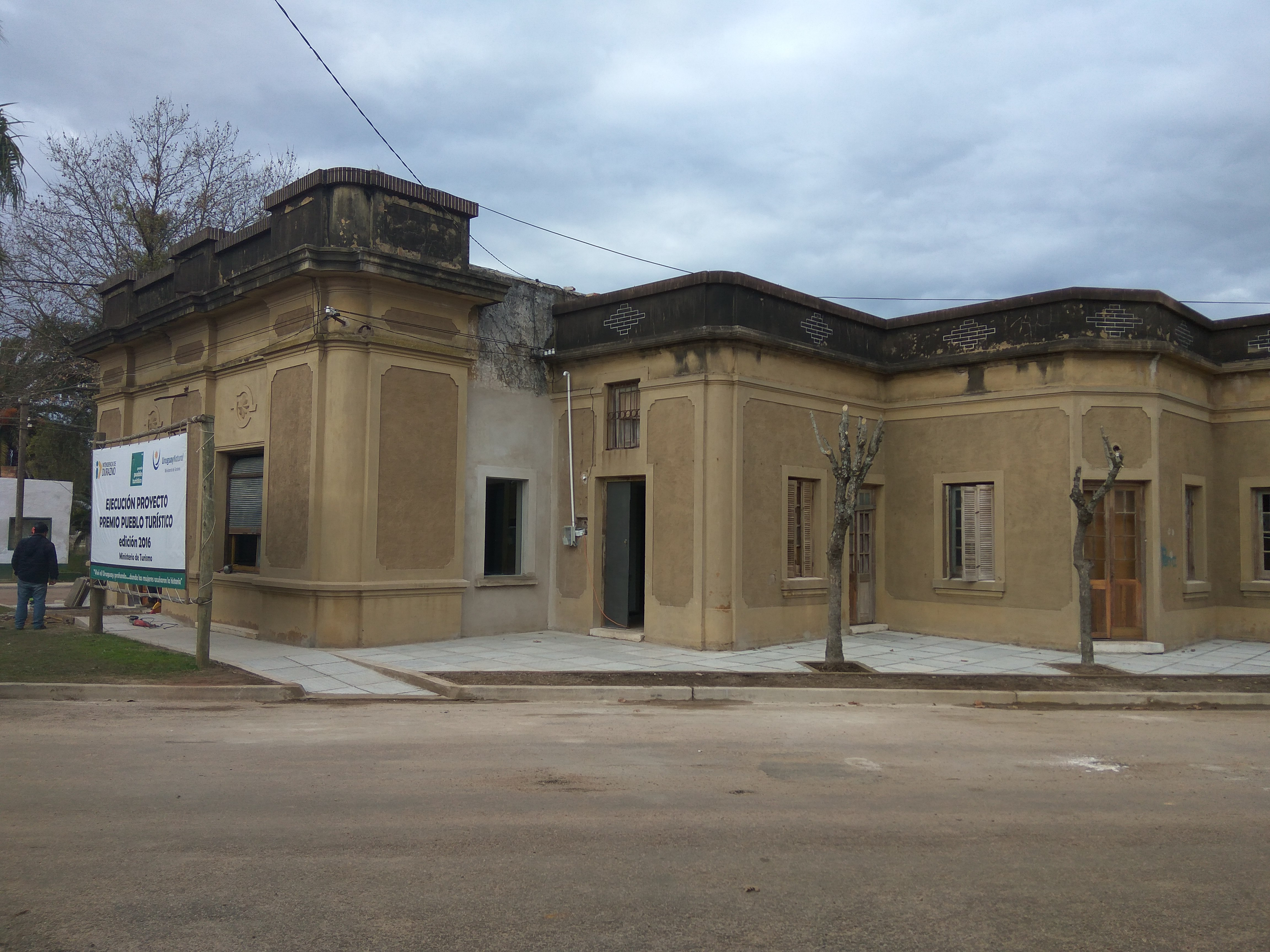 Edificio de la localidad de Cerro Chato (Uruguay) donde, el 3 de julio de 1927, votó por primera vez una mujer en Sudamérica. Ubicado en la esquina de las calles Julio Alberto Goday y Soubiron Calo, Cerro Chato. Edificio bajo tareas de restauración. Julio de 2018.